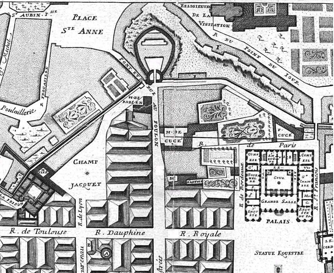 Extrait du plan de Rennes établi en 1726, réalisé suite à l'incendie de Rennes de 1720.